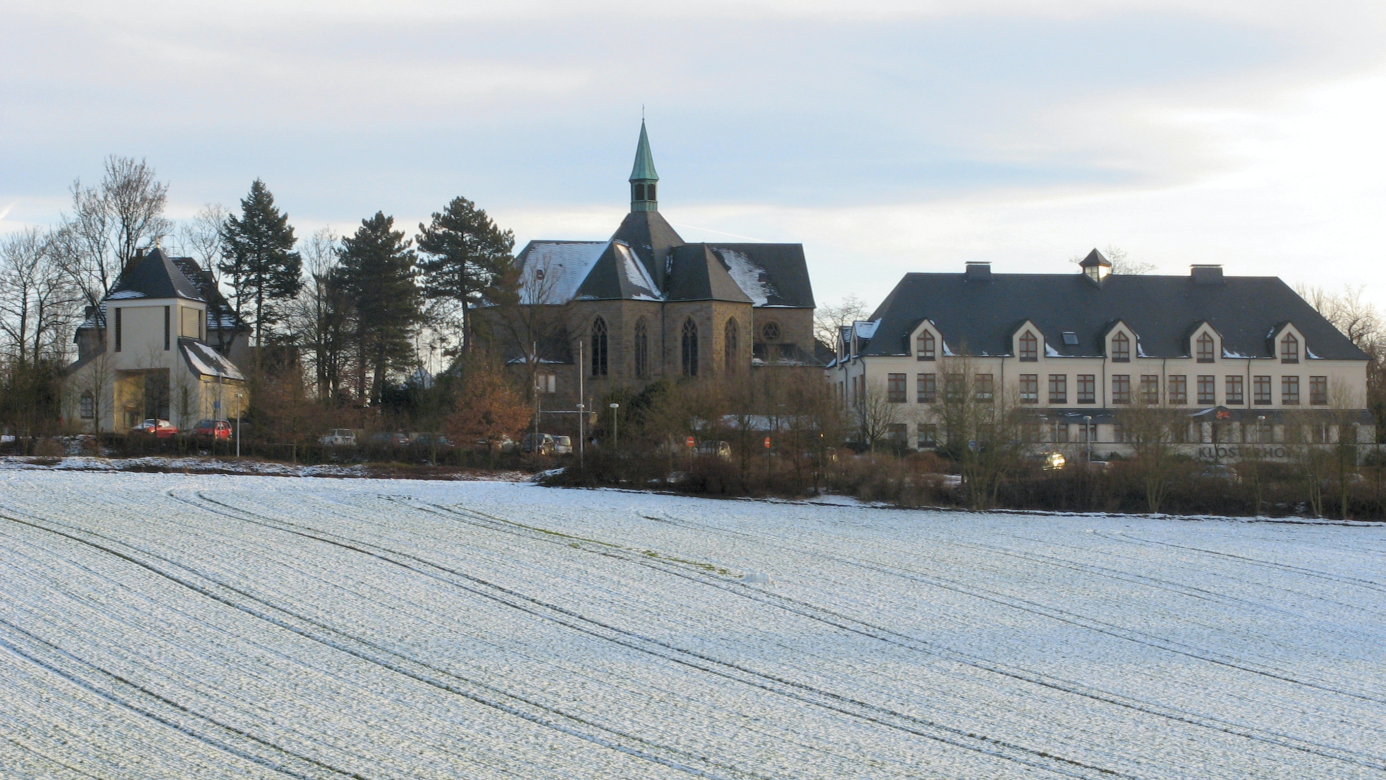 Bochum-Stiepel, Zisterzienserkloster mit Klosterkirche St. Marien Das Kloster wurde von 1988 bis 1990 in Zusammenarbeit des Bistums Essen mit dem Orden der Zisterzienser erstellt. Der Baustil entspricht weitgehend dem alten Klosterplan des Ordens, der im Hochmittelalter entworfen wurde. The monastery was built in 1988 to 1990 in cooperation with the Diocese of Essen and the Cistercian Order. The architectural plan was designed according to medieval prototypes.